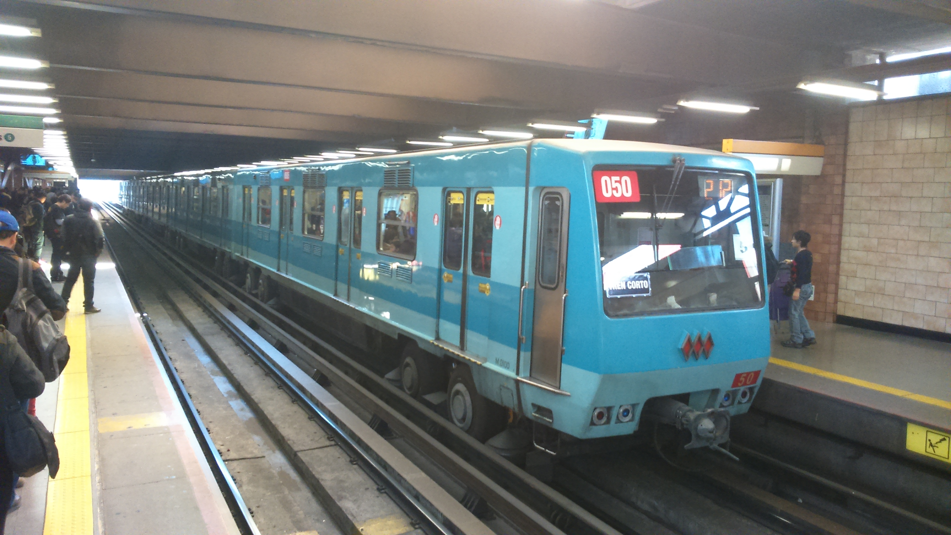 Tren 050 en Servicio en (L2)